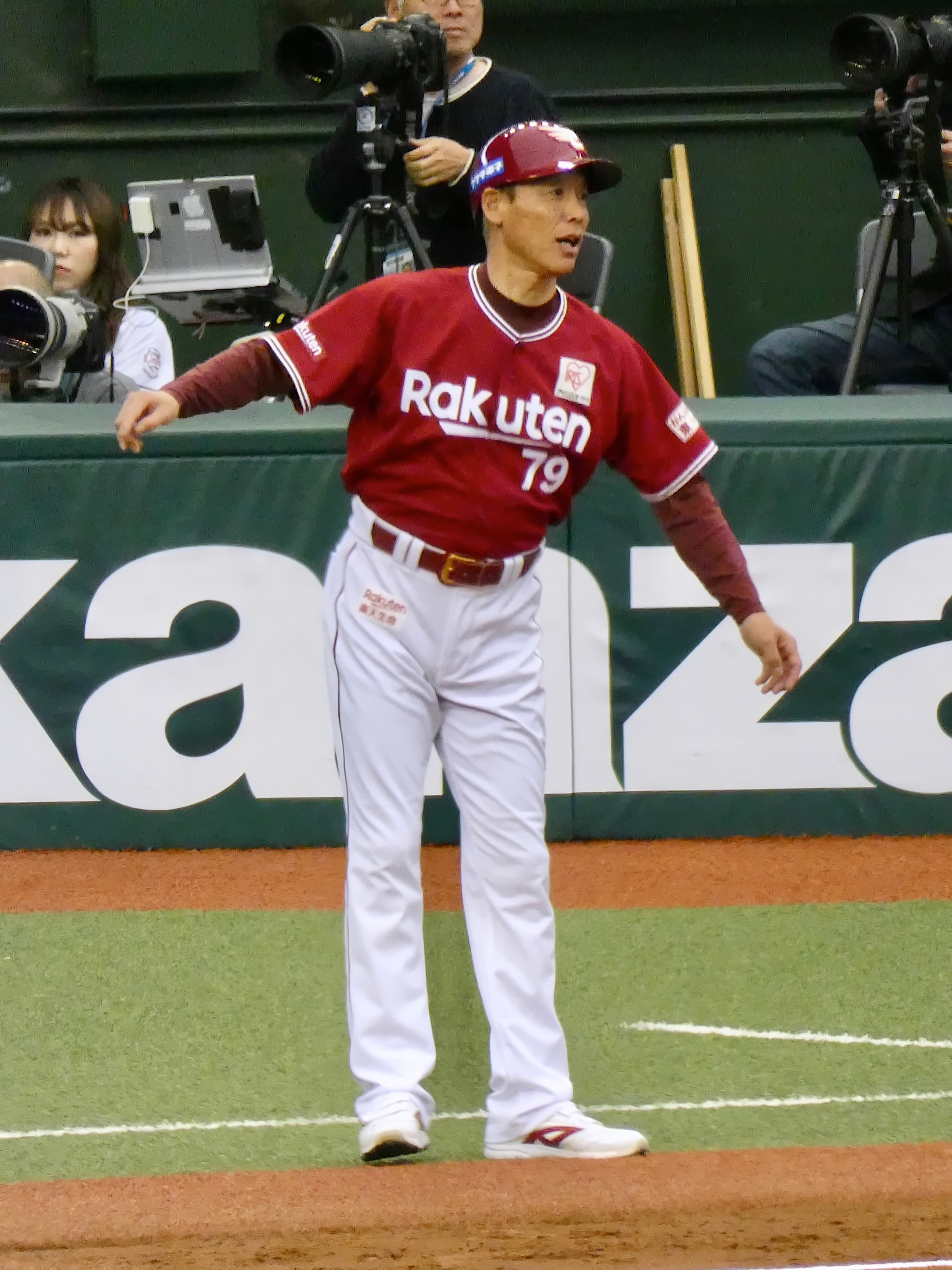 東北楽天ゴールデンイーグルスのコーチ「笘篠誠治」。メットライフドームにて。